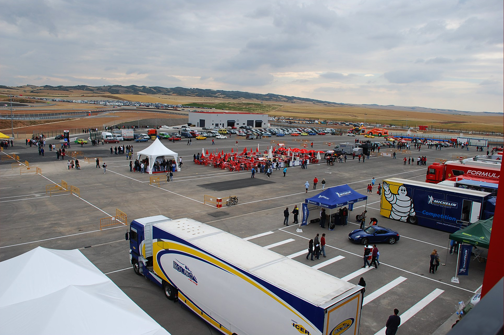 Paddock del Circuito de Navarra el día de su inaguración.